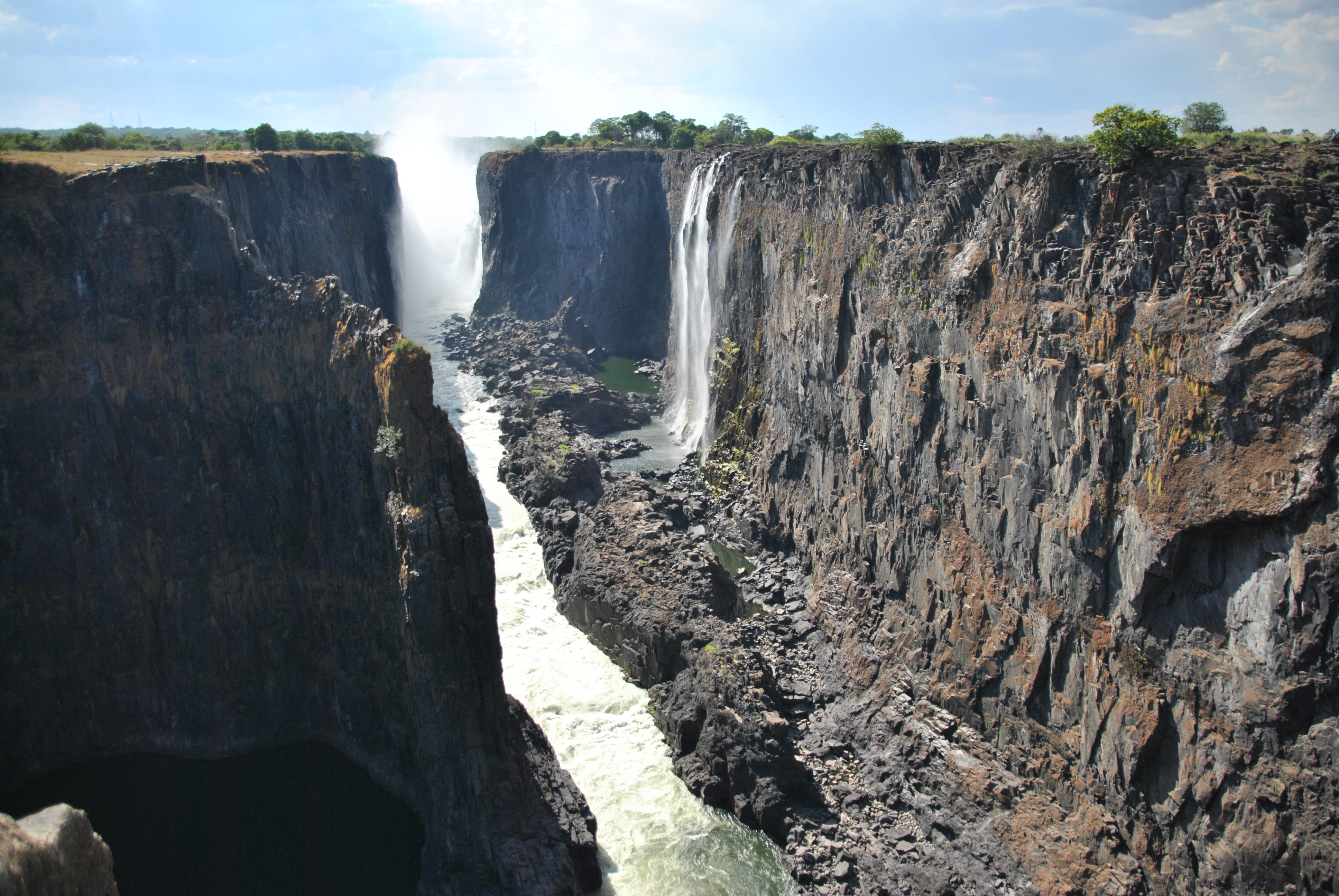 Zambeze and Victoria falls or Mosi-Oa-Tunya from Zambia